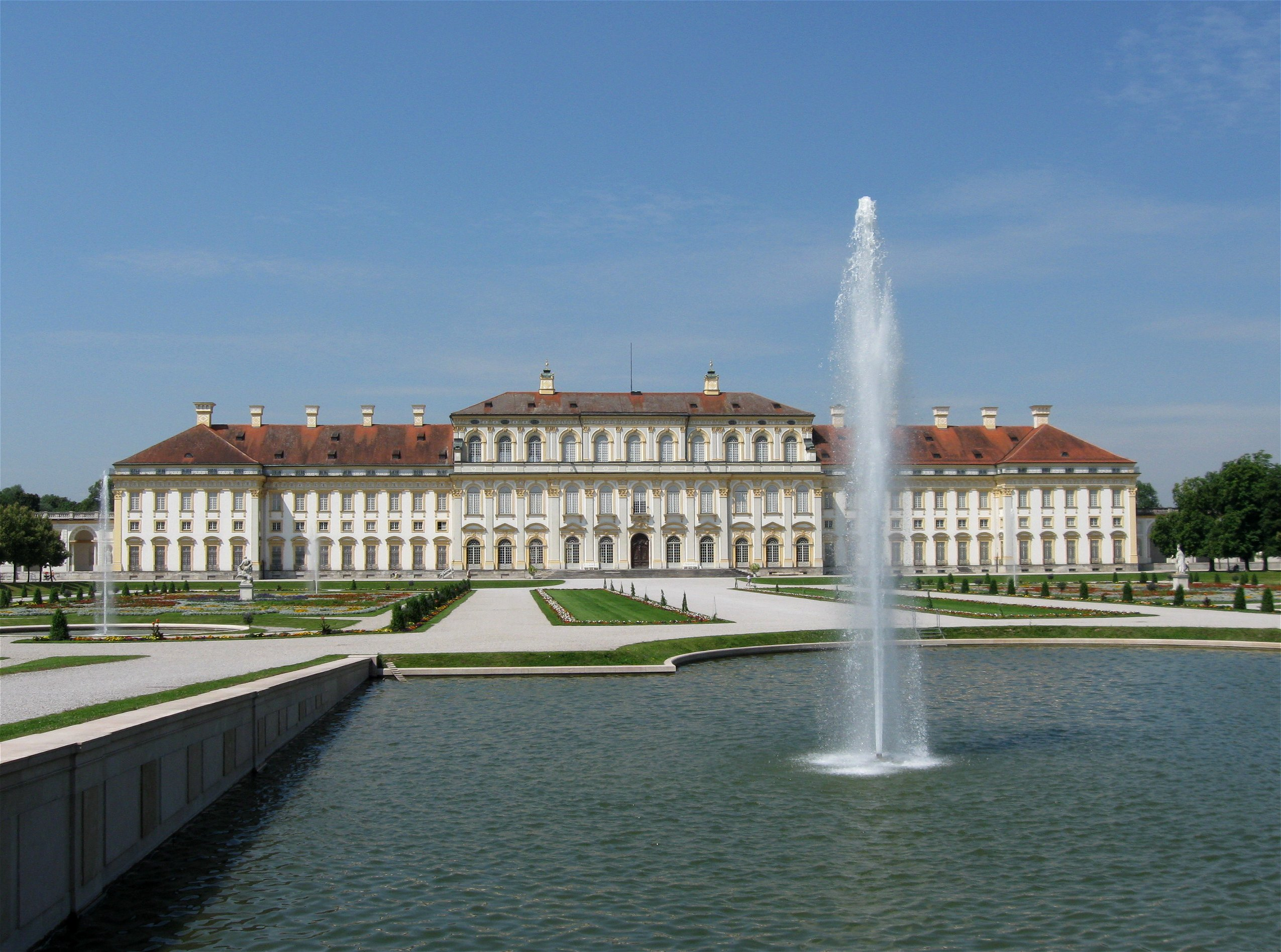 Neues Schloss Schleißheim, Schlosspark